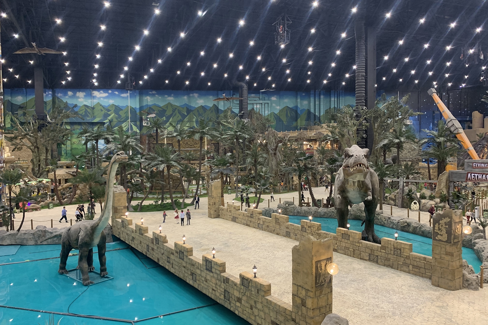 Президент РФ Владимир Путин и мэр Москвы Сергей Собянин открыли тематический парк развлечений «Остров Мечты» в Нагатинской пойме.